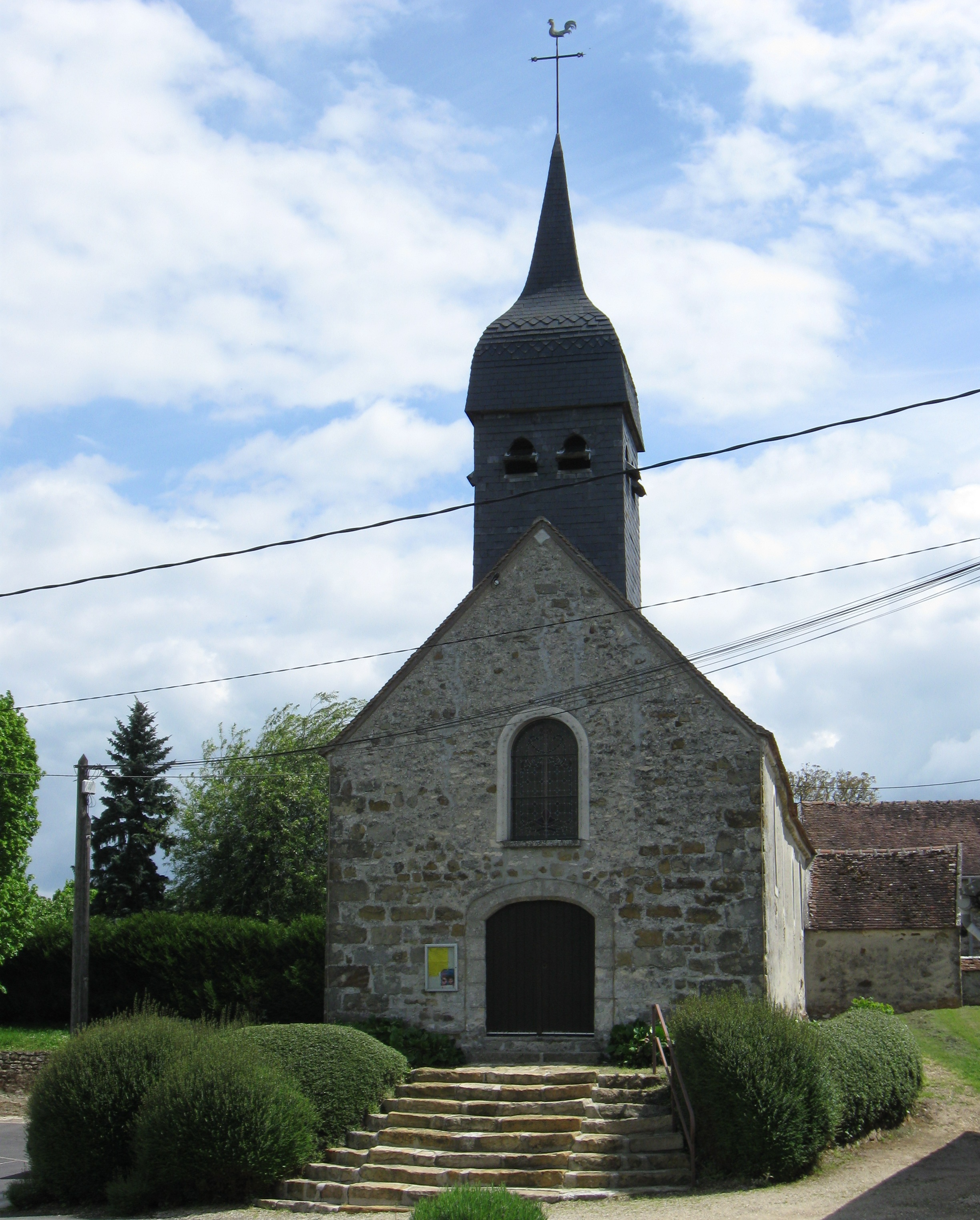 Église Notre-Dame-de-Lorette de Meigneux. (Seine-et-Marne, région Île-de-France).